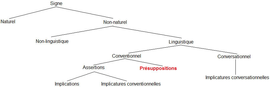 L'arbre décrit schématique les types d'inférences, en partant du signe. Le signe peut être naturel ou non naturel; un signe non naturel peut être non linguistique ou linguistique; un signe linguistique peut avoir un sens conversationnel ou conventionnel. La seule inférence ayant un sens conversationnelle est l'implicature conversationnelle. Les inférences au sens conventionel sont les assertions et les présuppositions. Il existe deux sous-types d'assertions, l'implication et l'implicature conventionnelle.